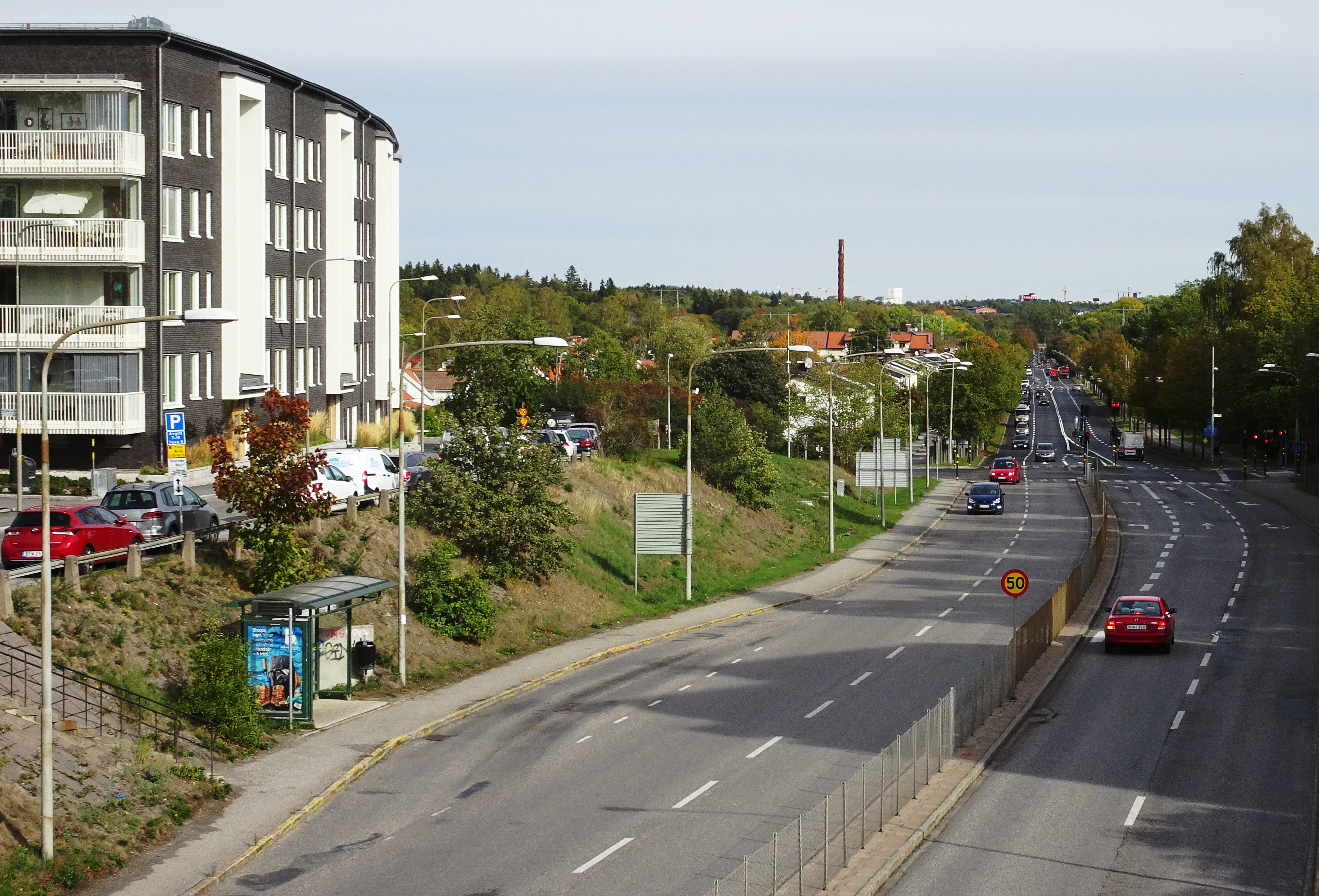 Nockebyhov och Drottningholmsvägen, vy mot öst.